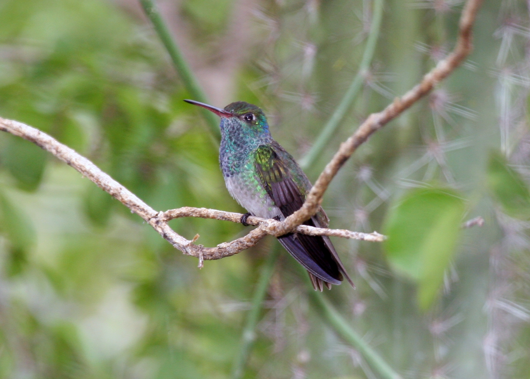 Honduran Emerald (Amazilia luciae)